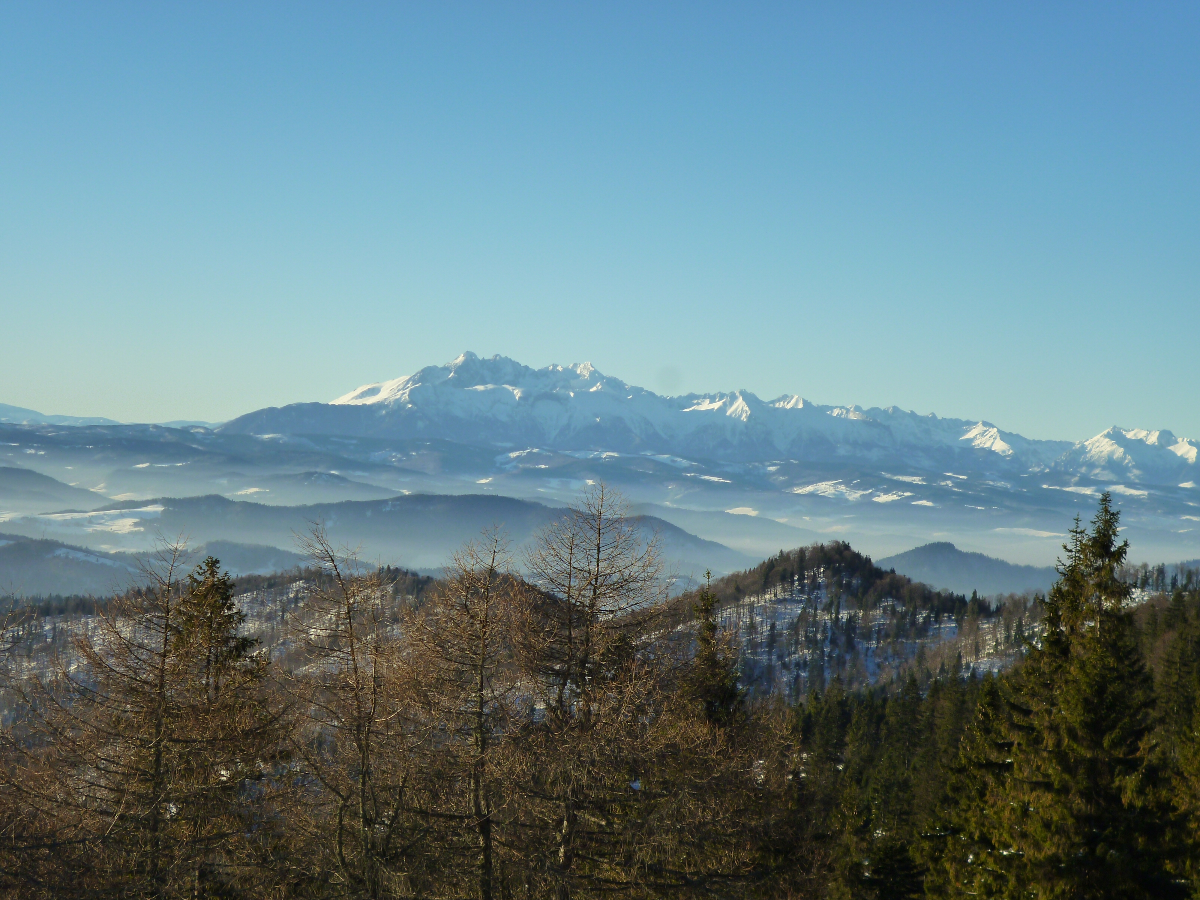 Widok Tatr ze Schroniska na Przehybie